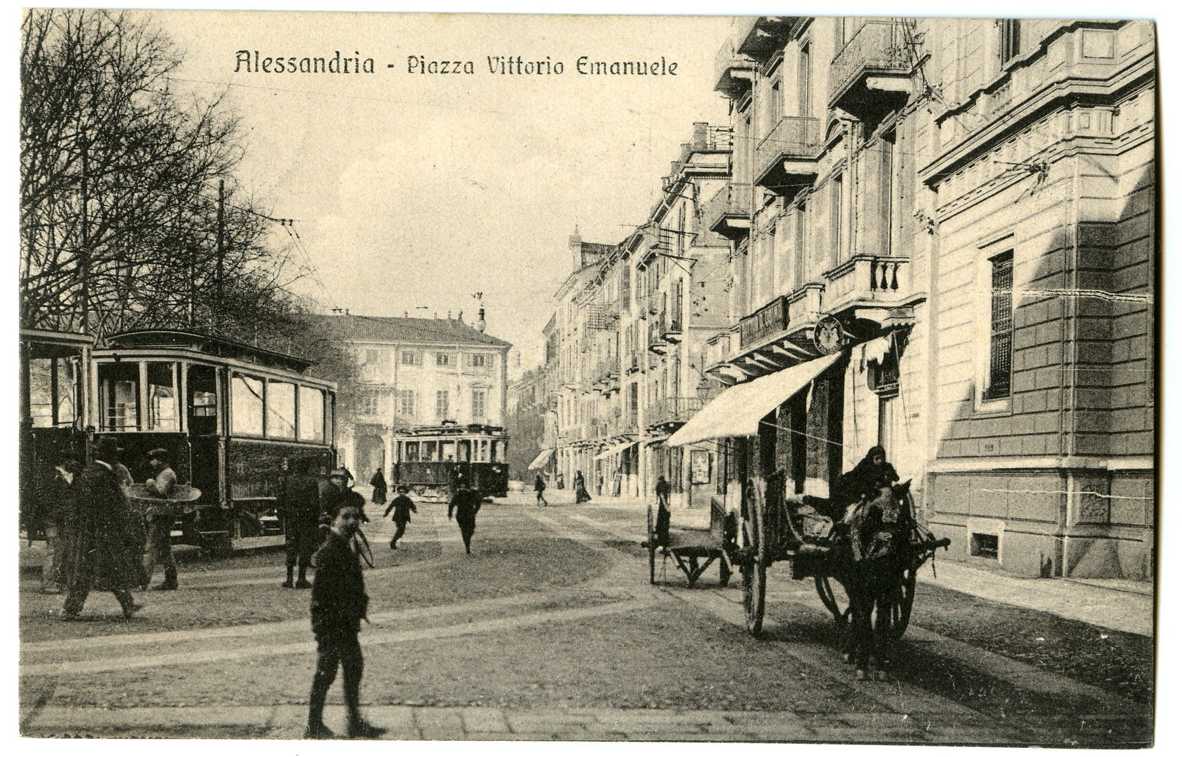 Cartolina della collezione di Tony Frisina, Alessandria